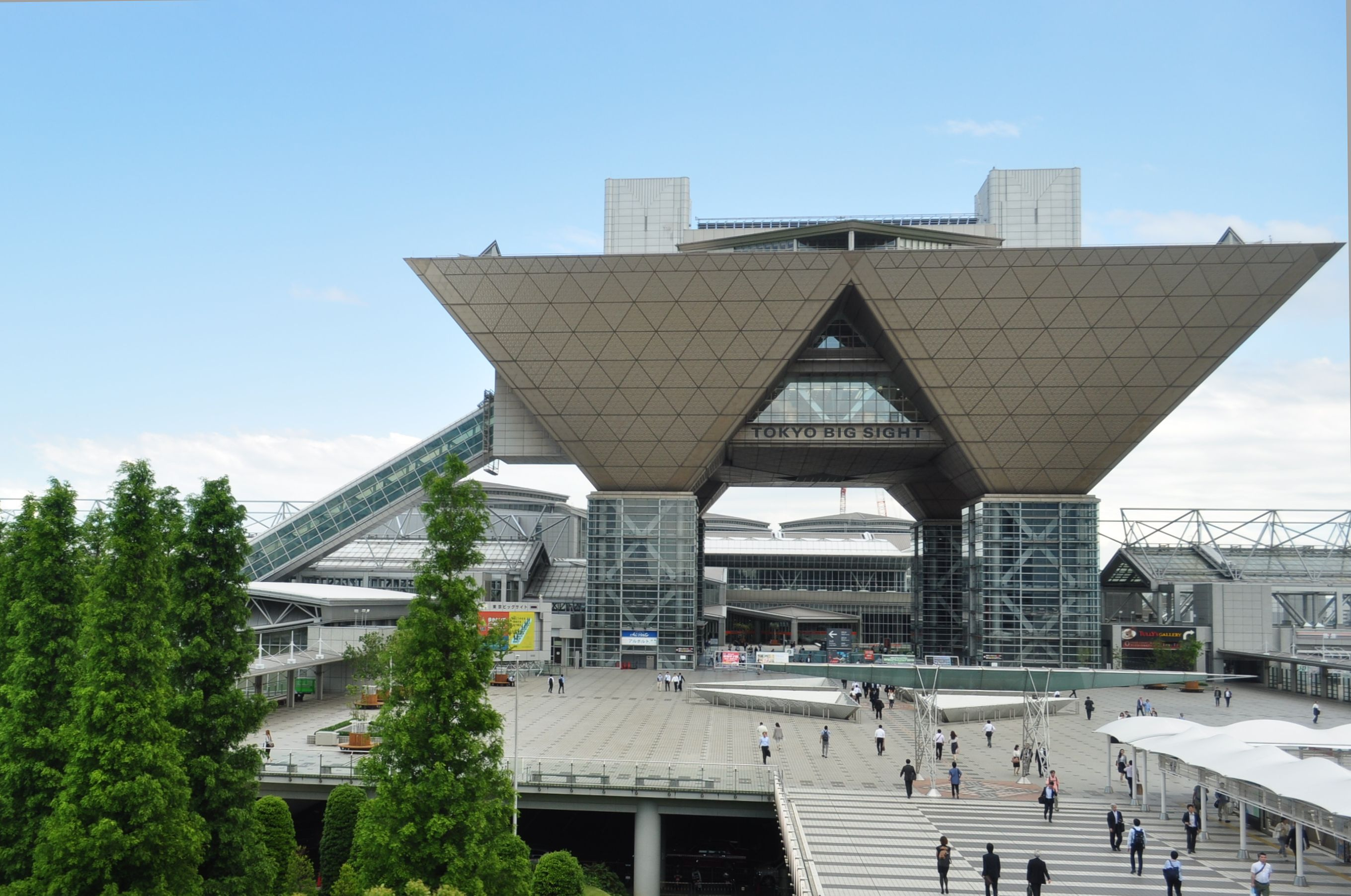 東京ビッグサイト